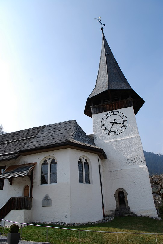 Vue de l'église de Zweisimmen (canton de Berne, Suisse)